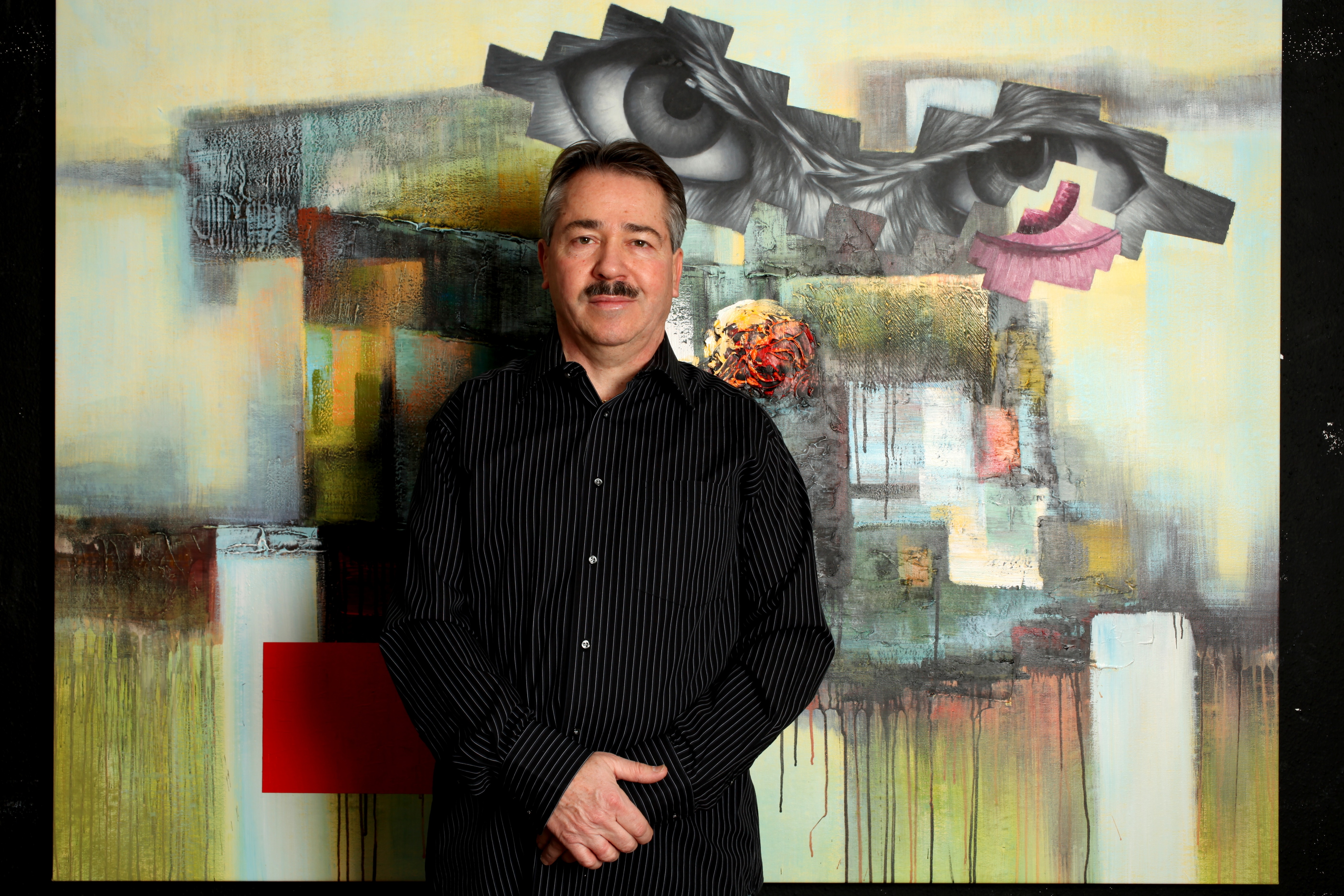 Artista Suiço